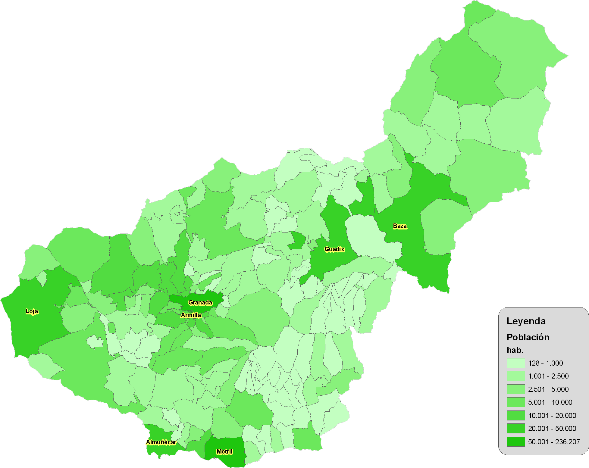 Mapa de población por municipios de la provincia de Granada en 2007.